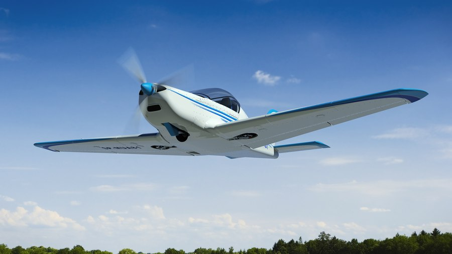 wizualizacja